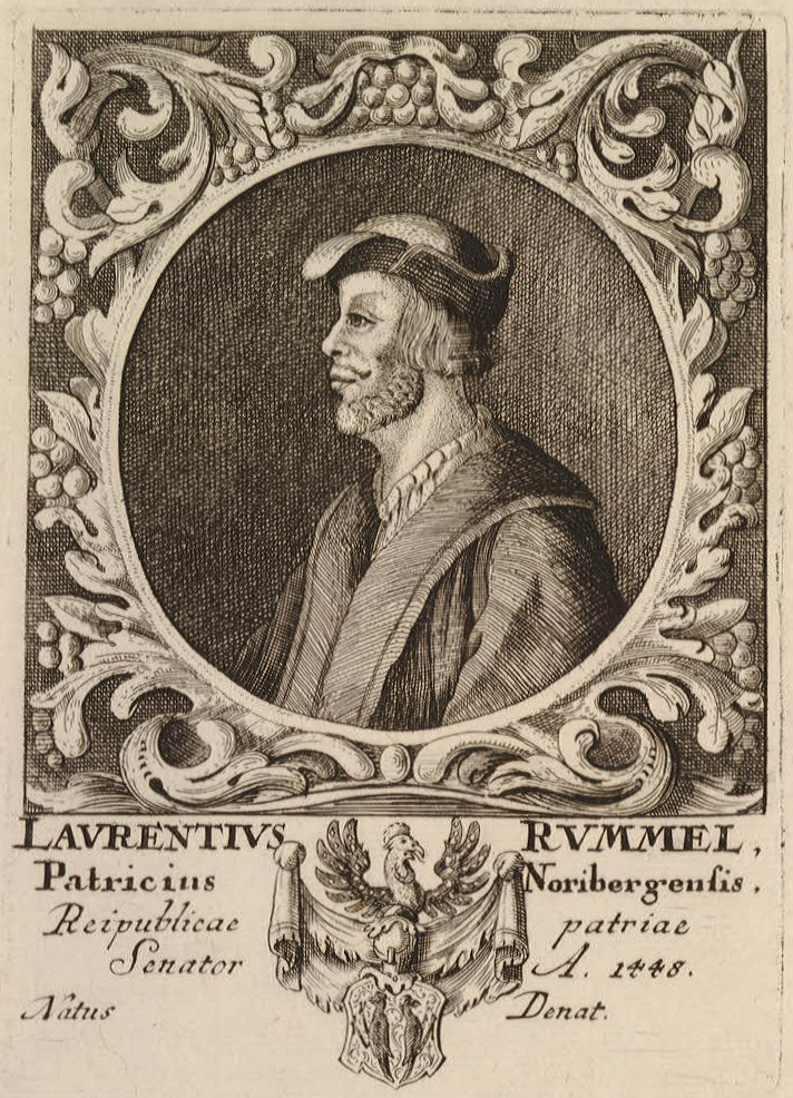 Portrait, Brustbild nach links blickend, mit Wappen des Nürnberger Patriziers Lorenz (Laurentius) Rummel, Ratsherr (Senator) 1448. Sohn des Mitbegründers des Handelshauses Rummel und Nürnberger Ratsherrn Wilhelm Rummel († 1425), Herrn von Lichtenau und Lonnerstadt (seit 1409 bzw. 1414). [1]